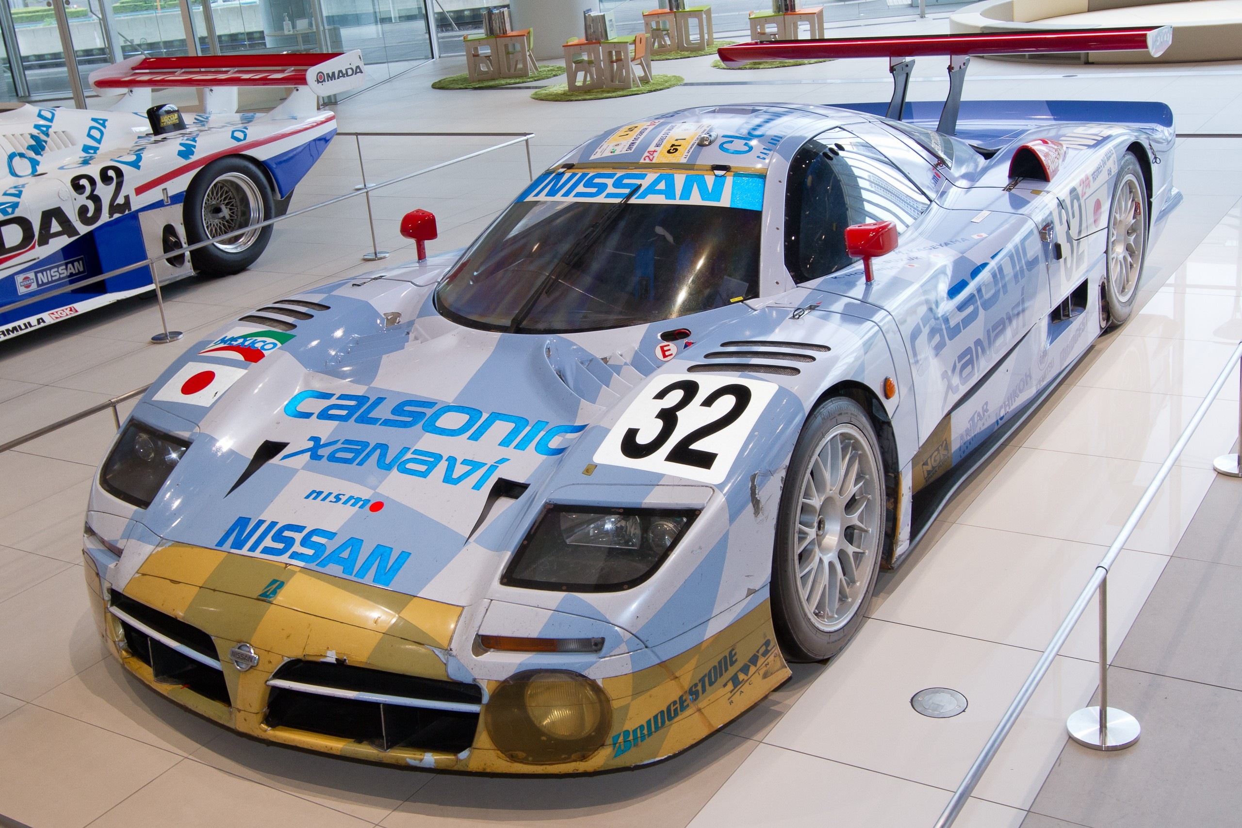 1998 Nissan R390 GT1 *real #32 car